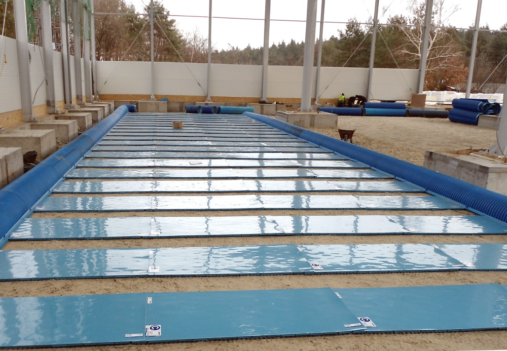 Gruntowy powietrzny wymiennik ciepła podczas montażu pod budynkiem.